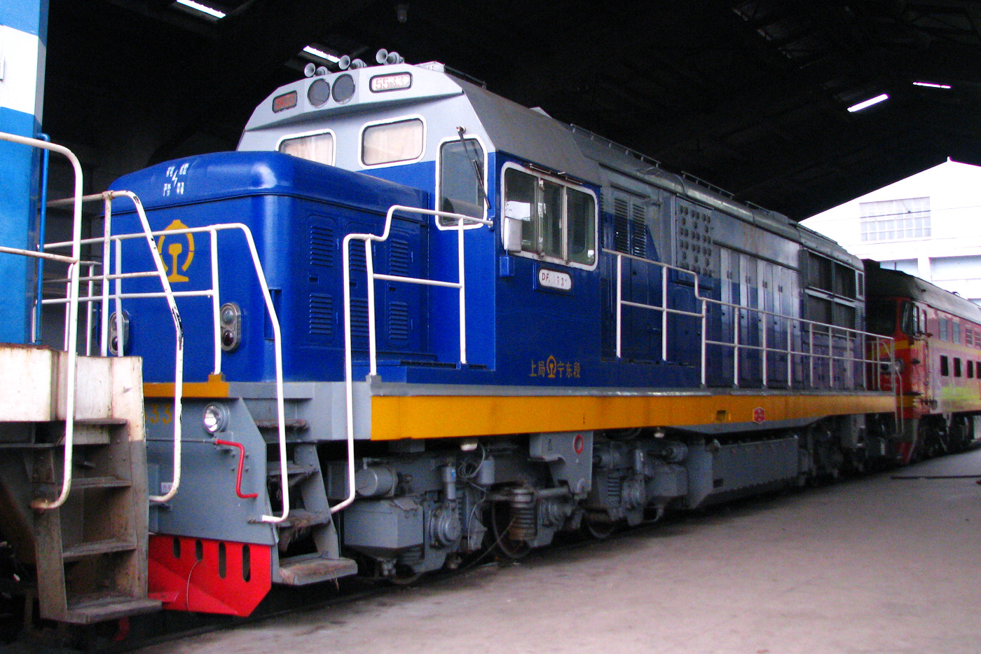 中国铁路标准化司机室东风7C型5533号内燃机车